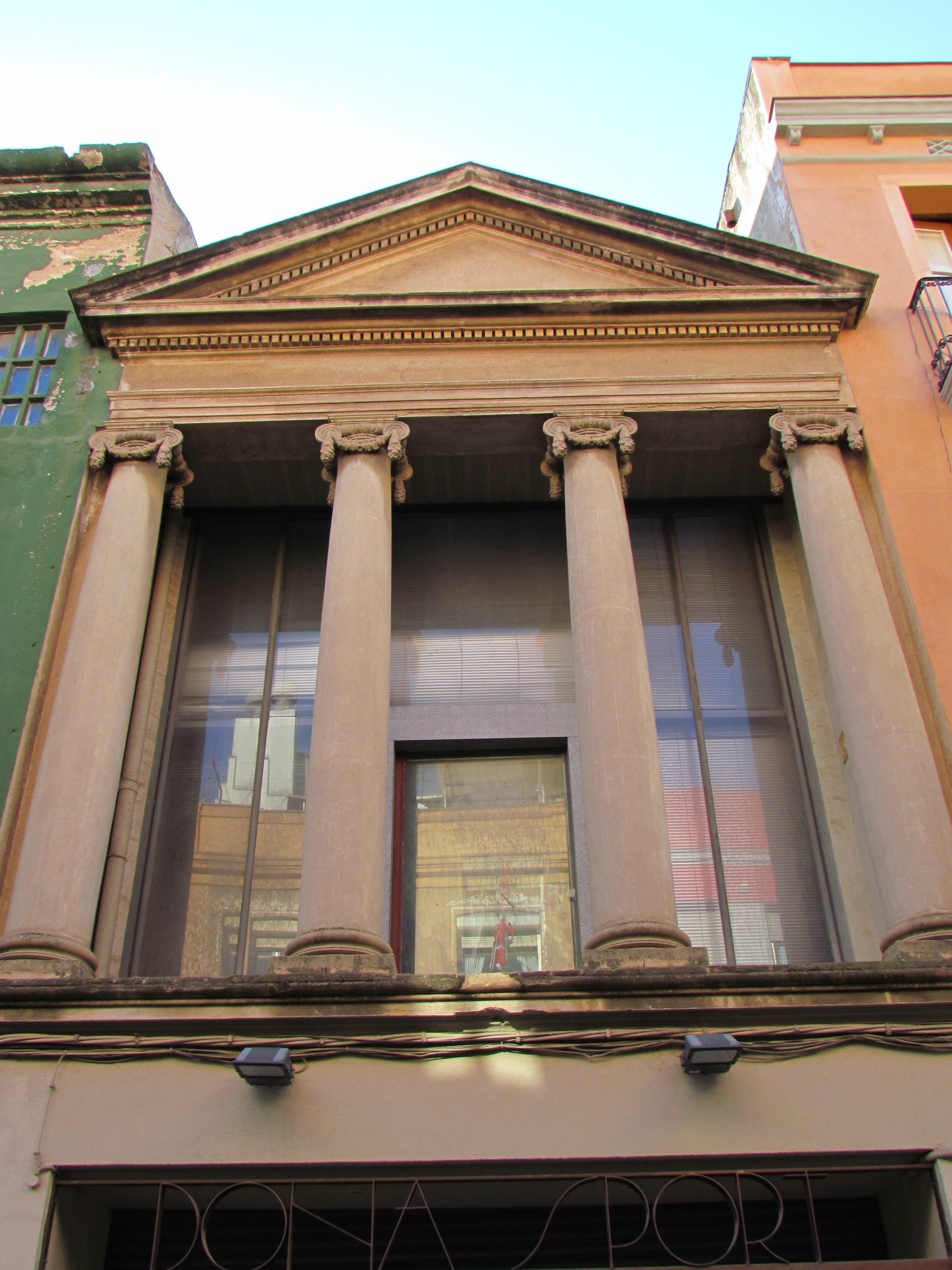 Vista de la Façana de l'antiga fàbrica Borràs i Massó. (Mataró, el Maresme)